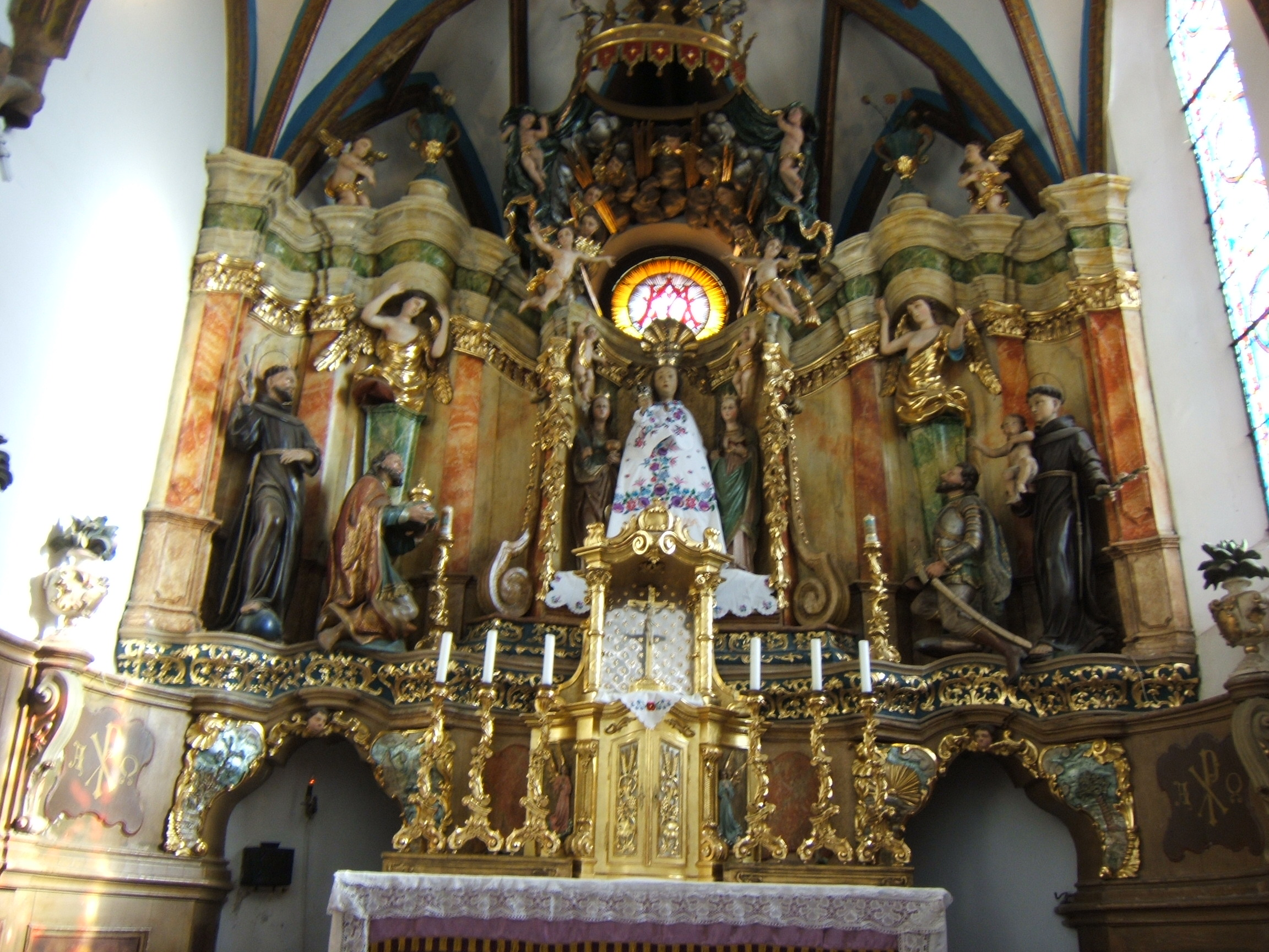 Andocs, Mária-szobor